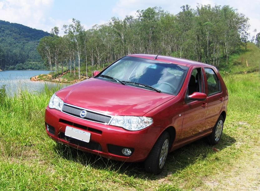 Automóvel Palio, modelo HLX Flex